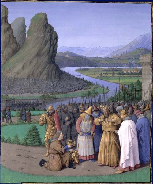 David et l'Amalécite Flavius Josèphe, Les Antiquités judaïques, enluminure de Jean Fouquet, vers 1470-1475 Paris, BnF, département des Manuscrits, Français 247, fol. 135v. (Livre VII) La mort de Saül est annoncée à David par l'Amalécite qui lui rapporte la couronne et le brassard du roi. De douleur, le roi David déchire ses vêtements.